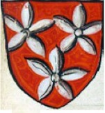 Armes de la famille du Merle au XIIIème siècle